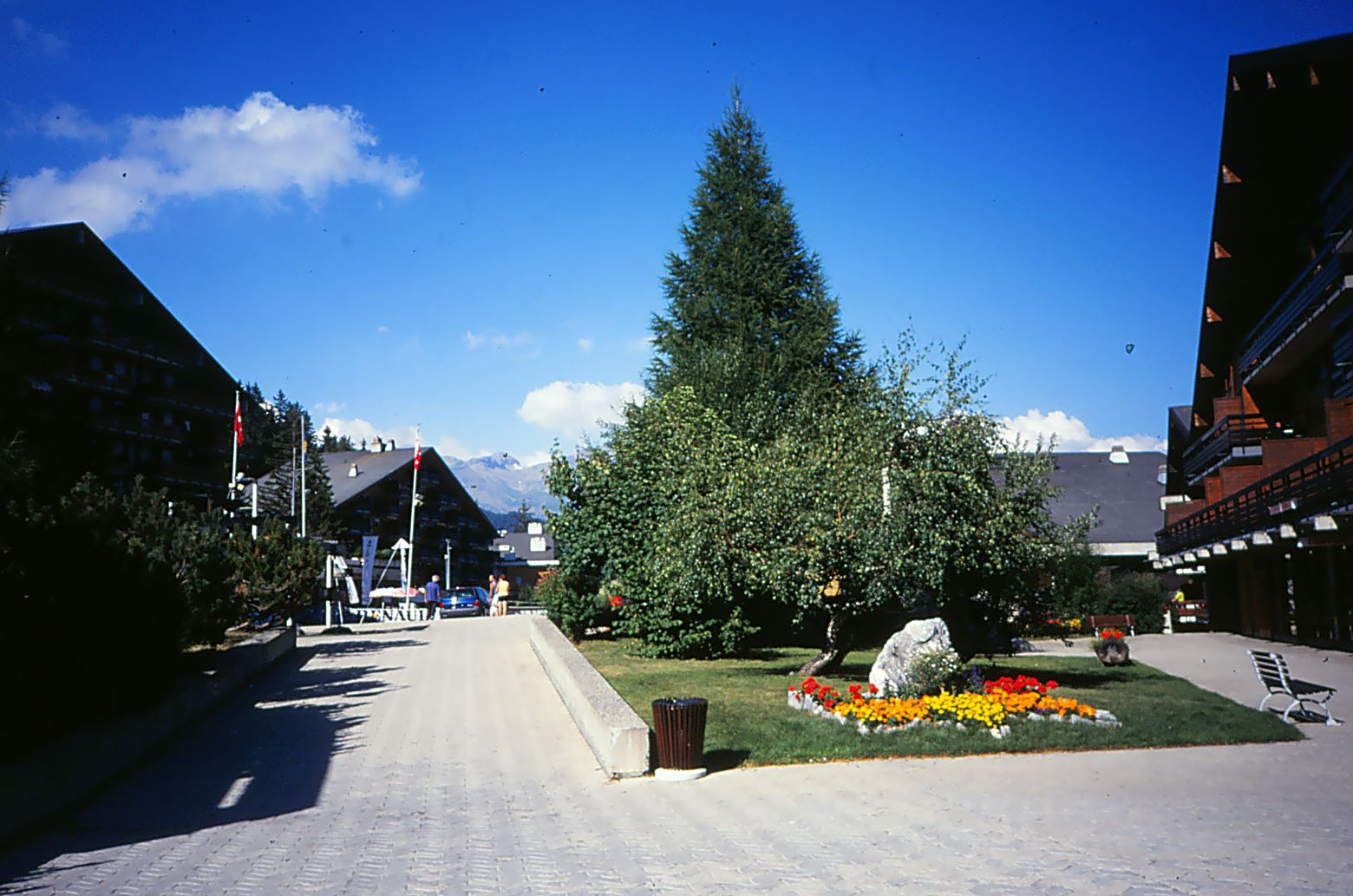 Torvet i Anzère